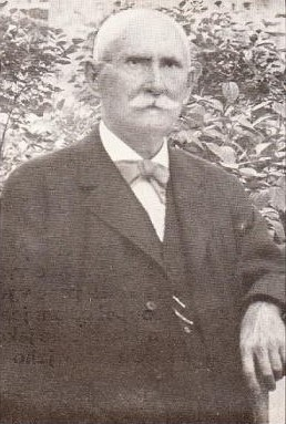 Antonín Berger (1861 - 1930), Pražský cukrář.